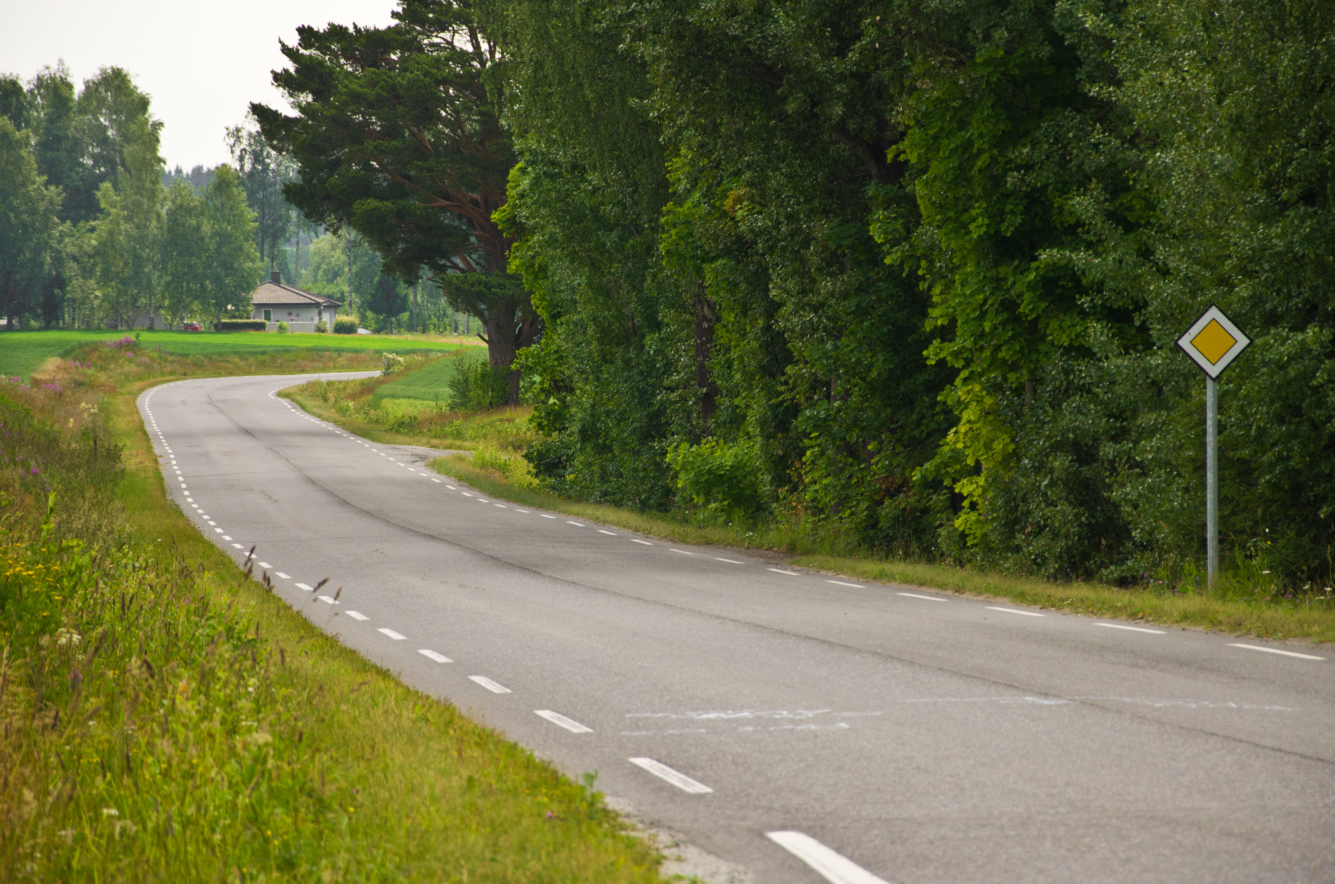 Fylkesvei 227 (tidl. 60), Bjørgedalsvegen i Hamar kommune